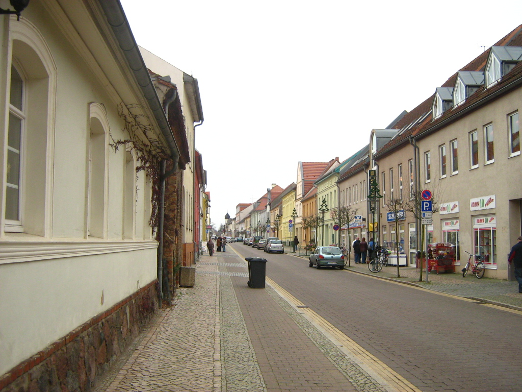 Hauptstraße in der Altstadt von Gransee (Landkreis Oberhavel)